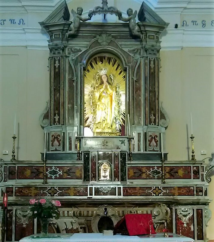 Statua di Maria SS degli Angeli, Pignola.